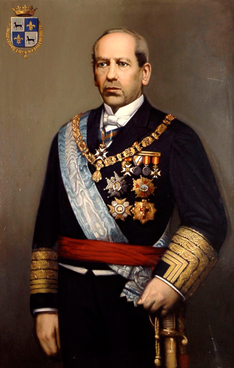 Retrato del almirante español Guillermo Chacón Maldonado (1813-1899).